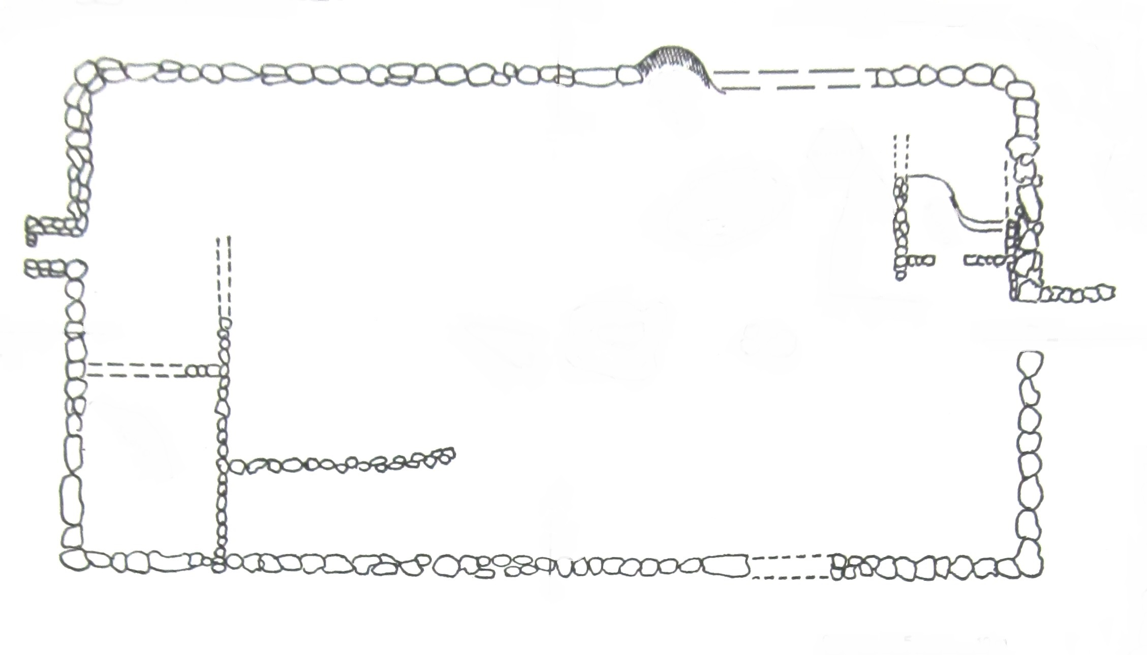 Elba Island